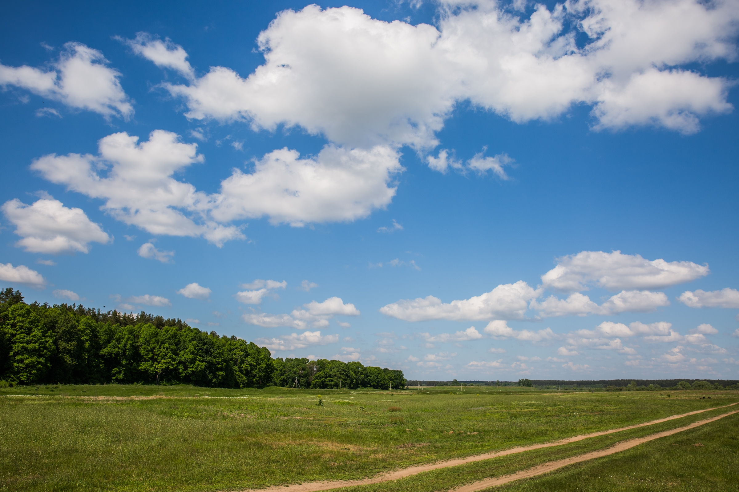 Дуденевский заказник: расположен в районе деревни Дуденево,д. Дуденево,Калининский район, Тверская область This image is related to the protected area of Russia number 6910389